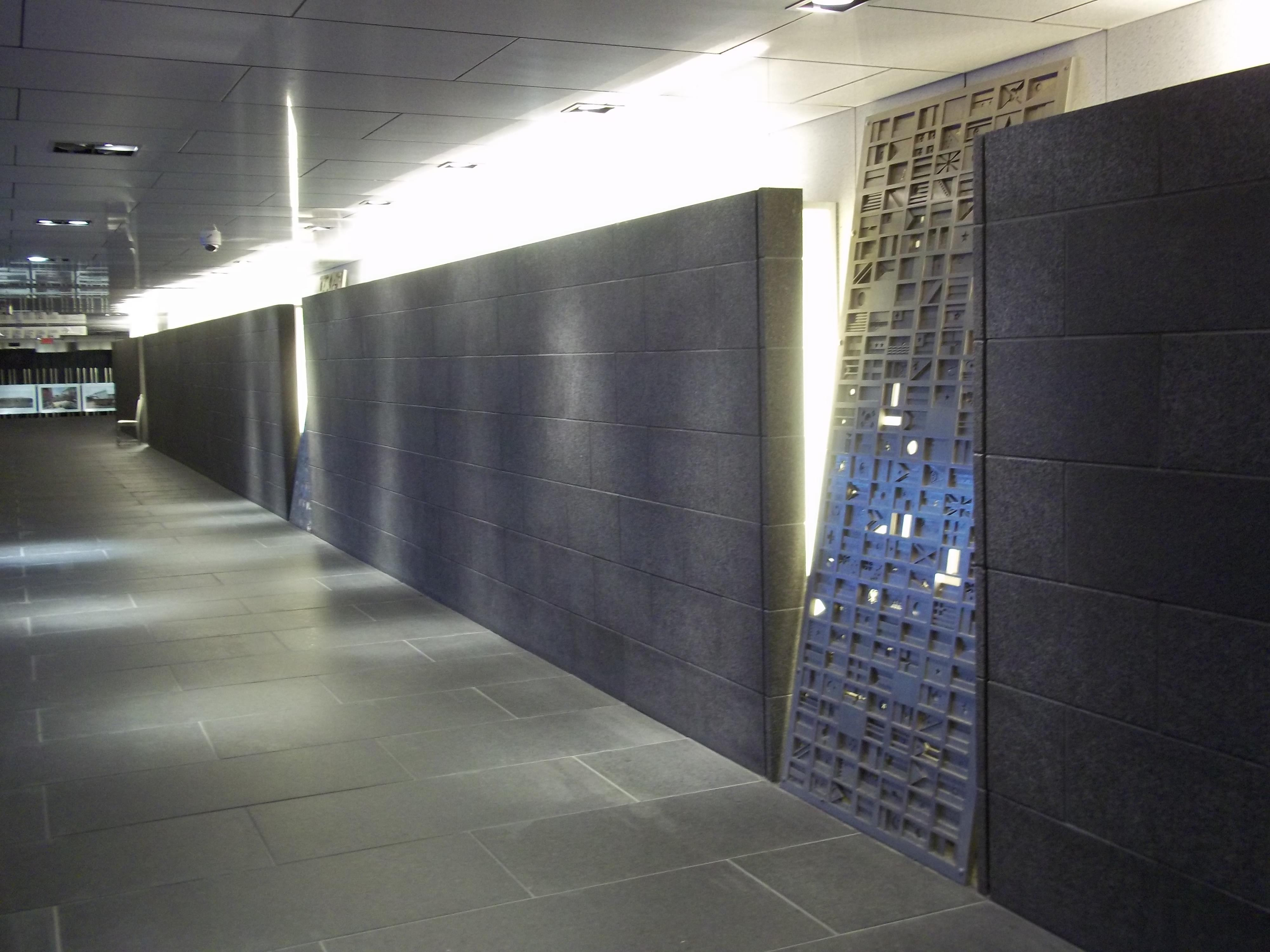 Sculpture de Michel Goulet intitulée Tables, de 2005. Elle est située dans le Montréal souterrain, dans le périmètre du Quartier international de Montréal, à l'entrée de la place Jean-Paul-Riopelle. « J'ai toujours privilégié dans mon travail l'usage d'objets issus du quotidien, des outils, du mobilier domestique mais aussi des signes qui, par convention sociale, sont des précis d'idées et de concepts. Je tiens pour acquis qu'une chaise ou la lettre « A », tout en étant réels, n'ont plus temporairement d'efficacité ou de valeur en soi, mais en tant que signes de quelque chose d'autre. La fonction symbolique de l'art est mieux servie par des associations d'images (ou d'objets) qui animent l'esprit que par celles qui illustrent ou racontent. »